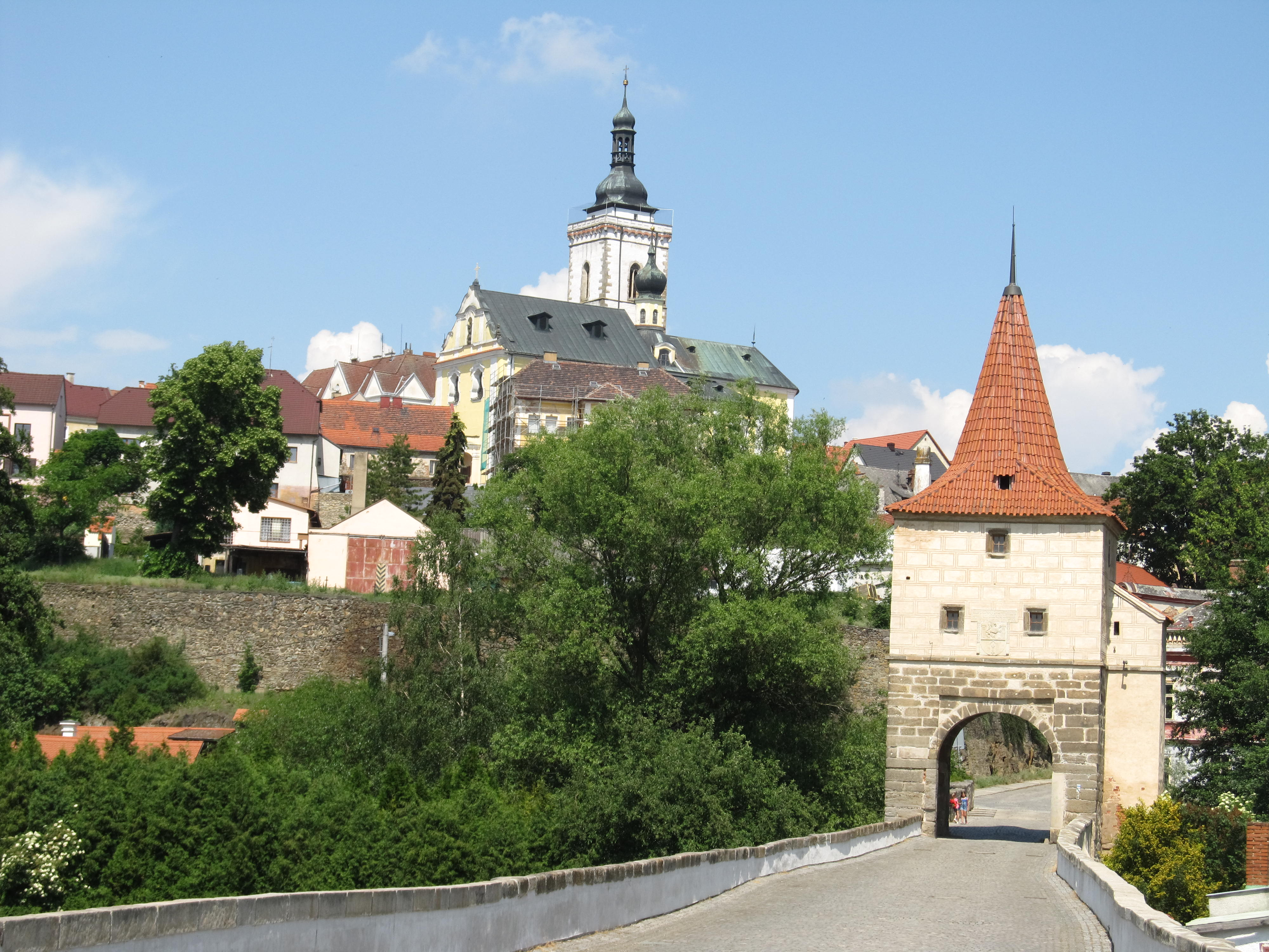 Renesanční most s bránou přes řeku Mži